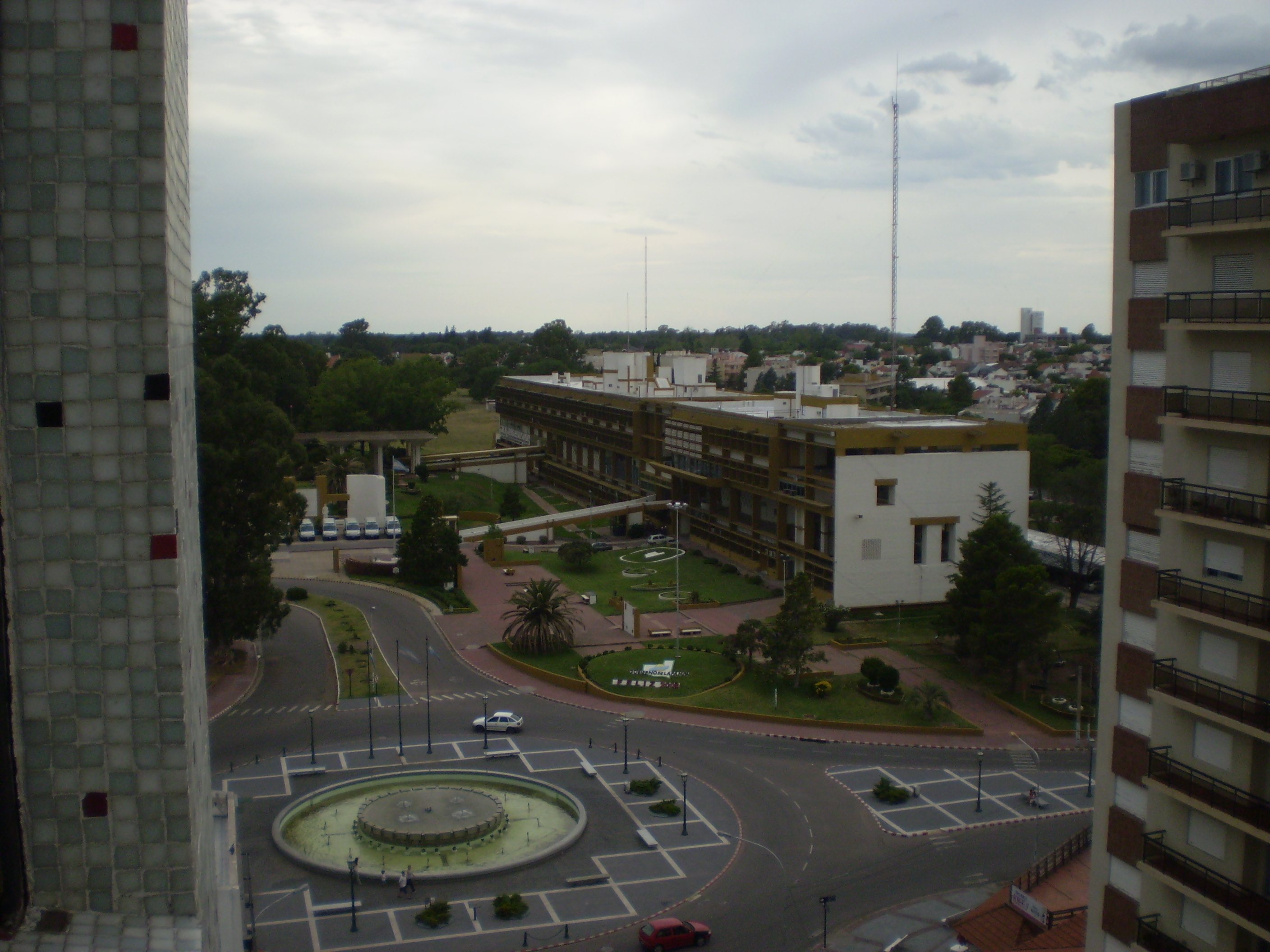 Santa Rosa, La Pampa, Argentina, government house